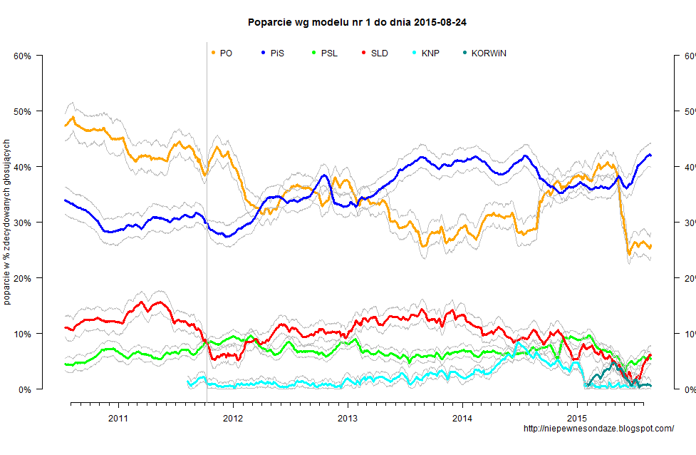 Szczegółowy opis znajduje się tu